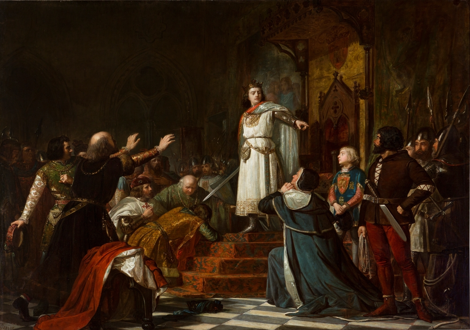 La obra muestra al rey Enrique III de Castilla (1379-1406) imponiéndose y corrigiendo a los nobles de Castilla.